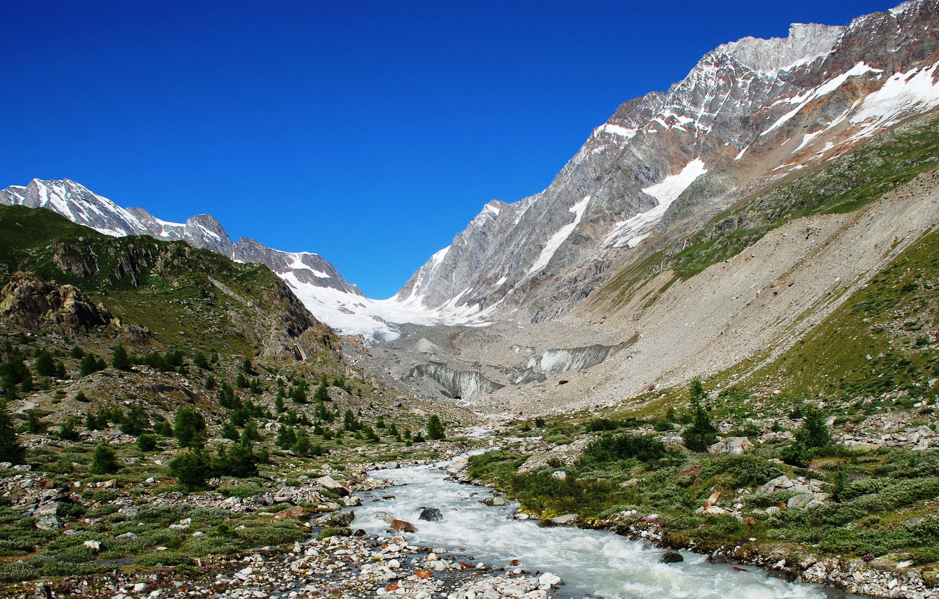 en.: Langgletscher at Lötschental, Switzerland; dt.: Langgletscher im Lötschental, Schweiz